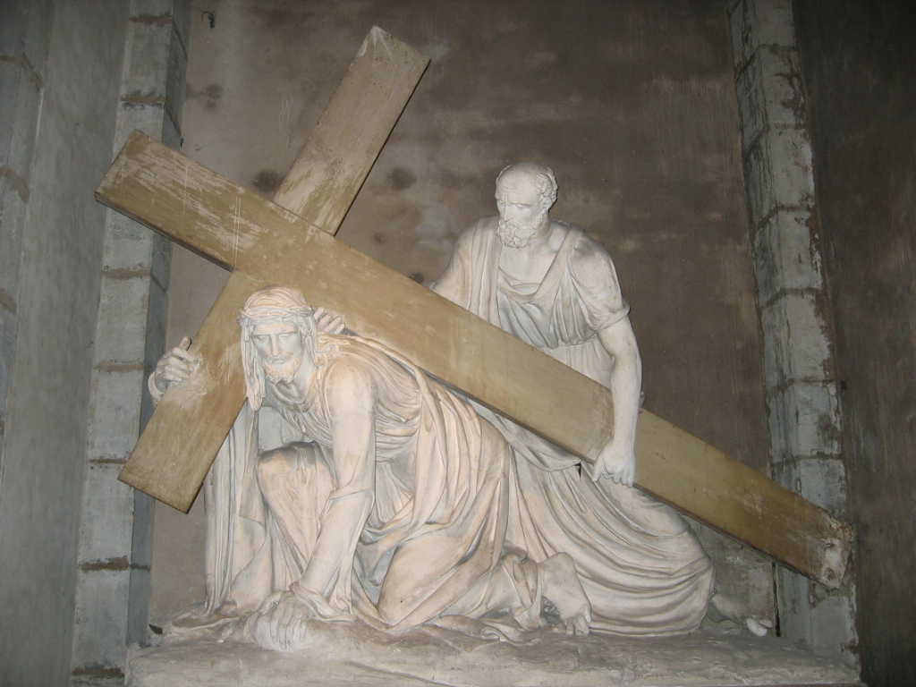 Sculpture biblique du sculpteur Auguste Clésinger à l'Église de la Madeleine de Besançon en Franche Comté - France